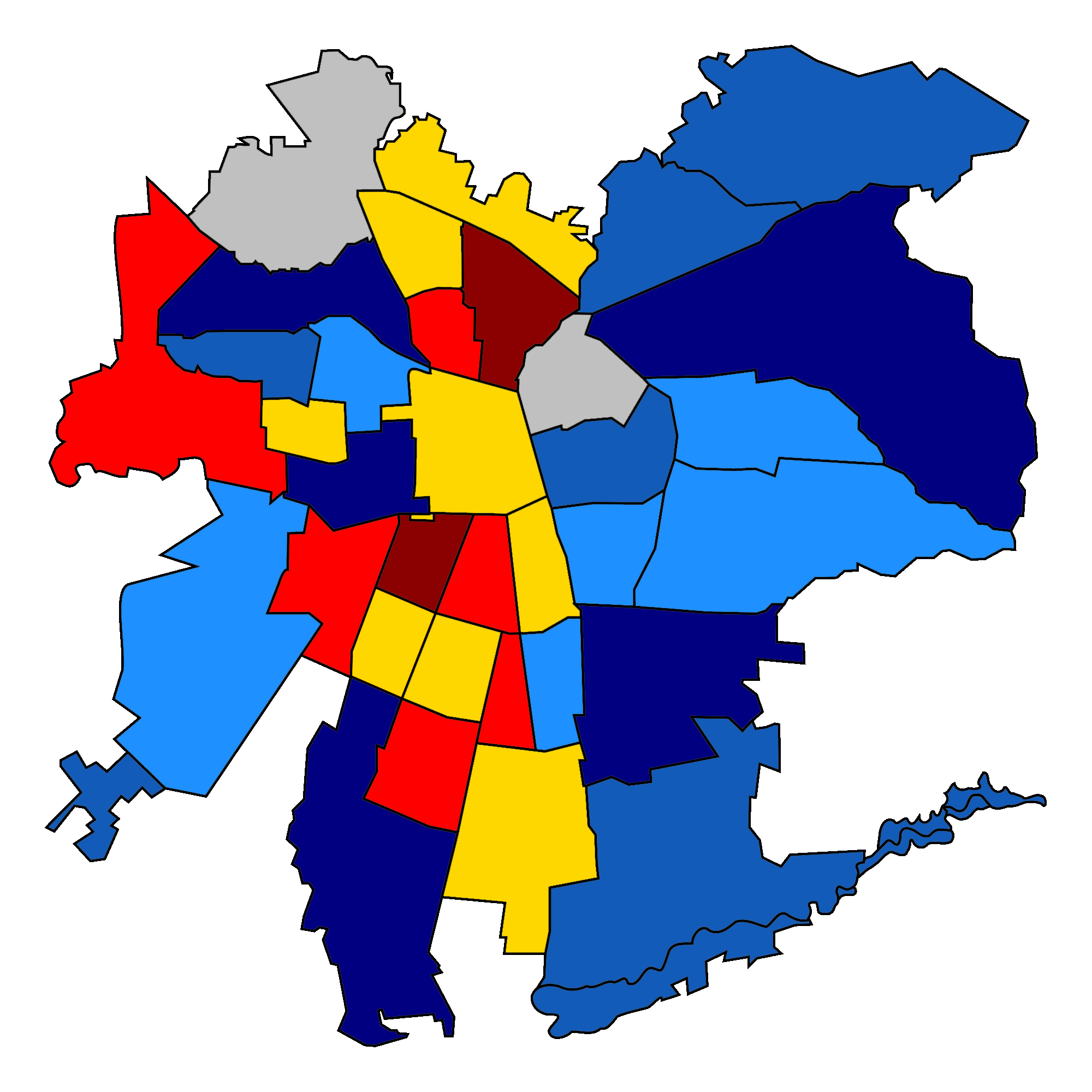 Resultado de las elecciones de alcaldes de 2012 en las comunas del Gran Santiago PCCh PS PPD PDC Independientes RN UDI